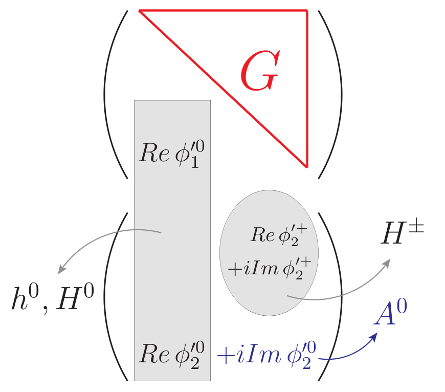 Grados de libertad de los dobletes escalares que aparecen en el mecanismo de rotura espontánea de la simetría en modelos con dos dobletes de Higgs. Se señalan qué combinaciones de estos grados de libertad dan lugar a los bosones físicos, y cuáles son los de Goldstone.